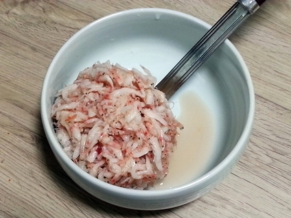 새우젓